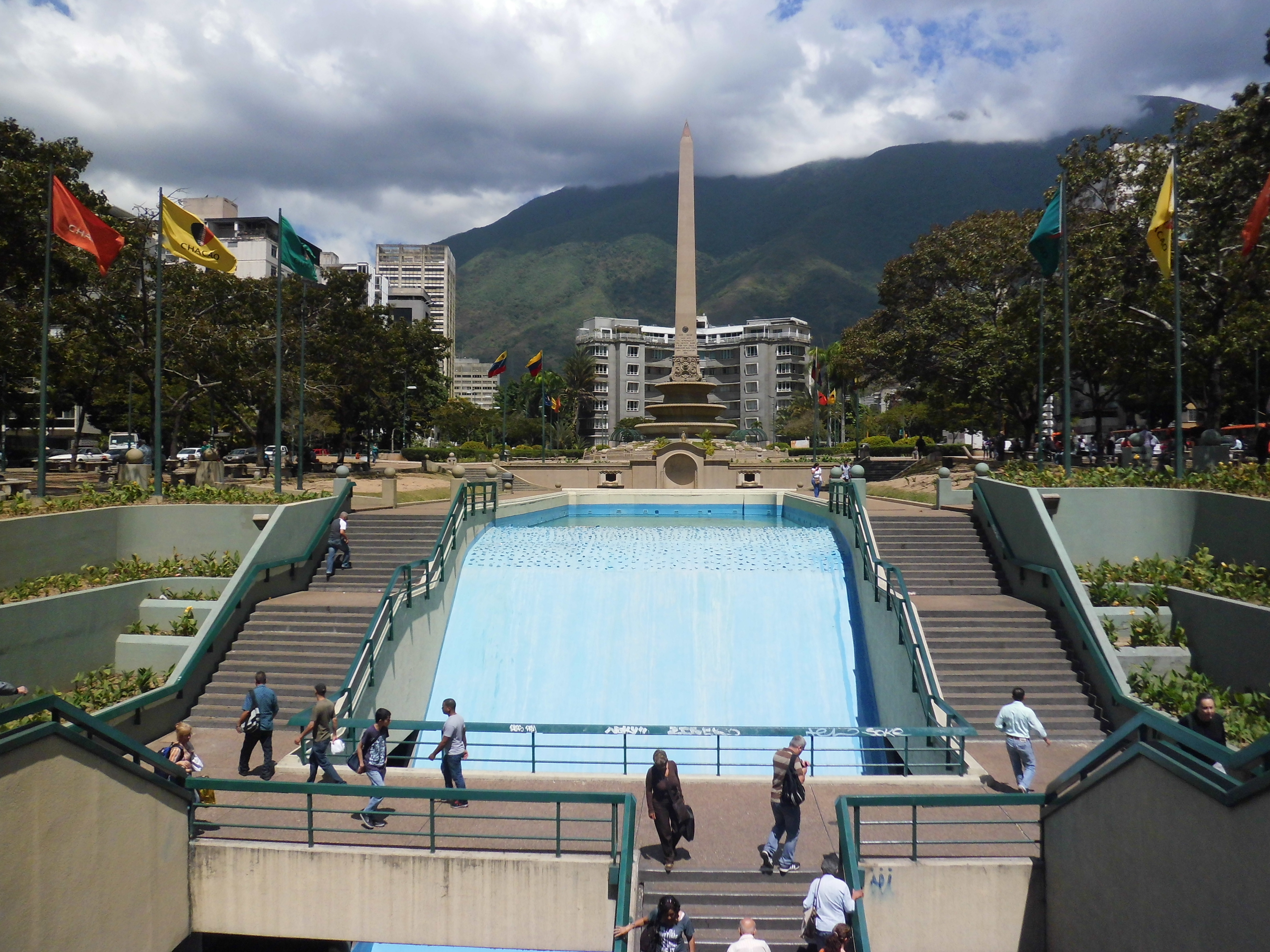 Plaza Francia e inmediaciones (Altamira) municipio Chacao, estado Miranda - Venezuela